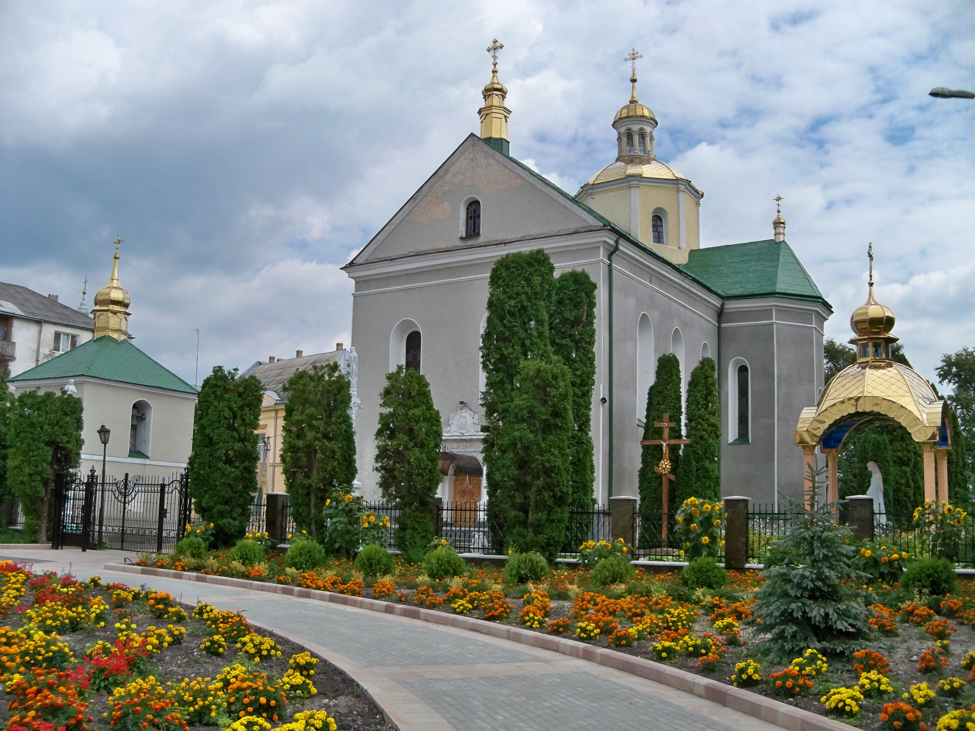 Церква Воскресіння Господнього (мур.), Золочів, вул.Шашкевича, 22